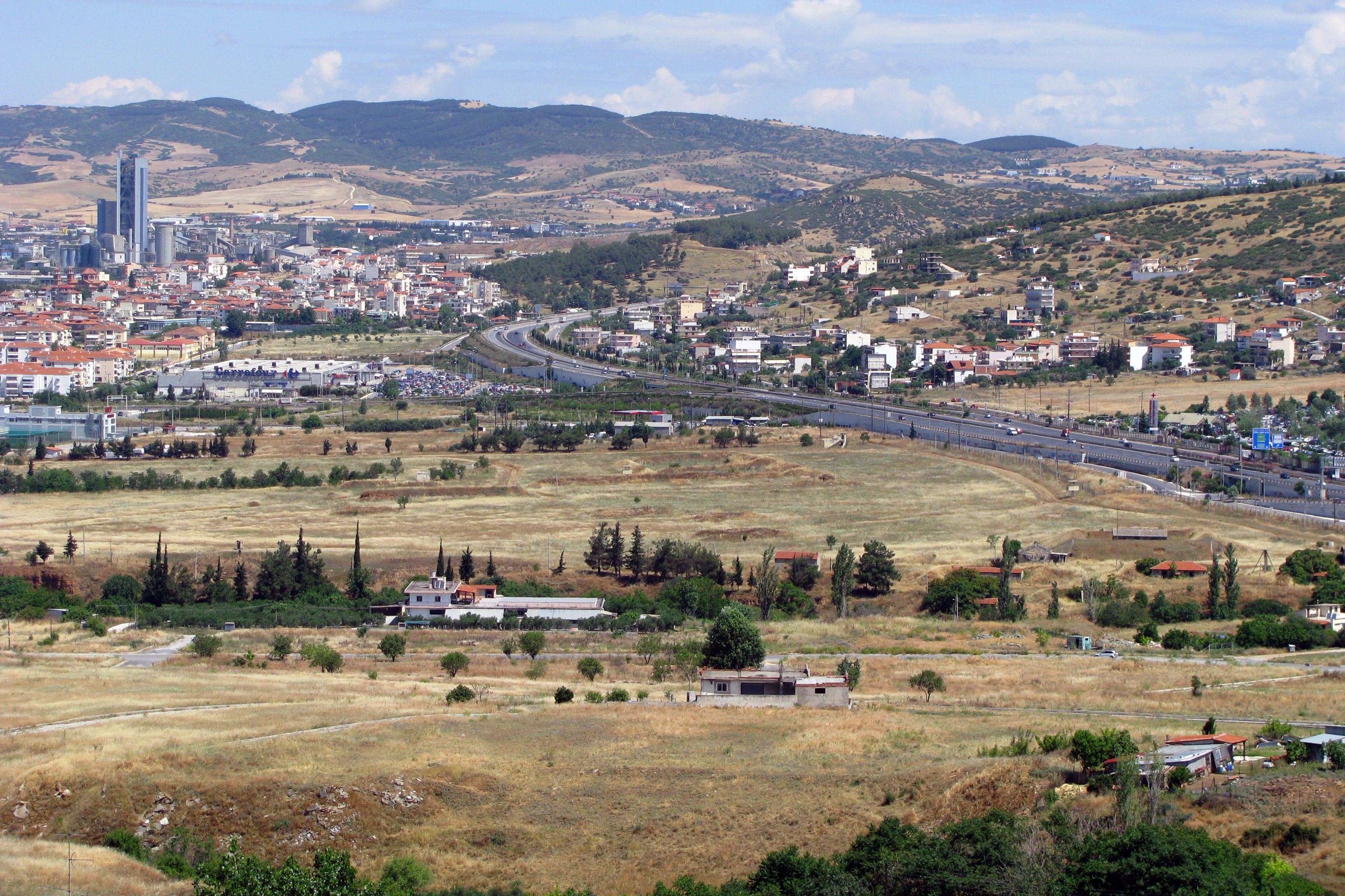 Ο Περιφερειακός της Θεσσαλονίκης